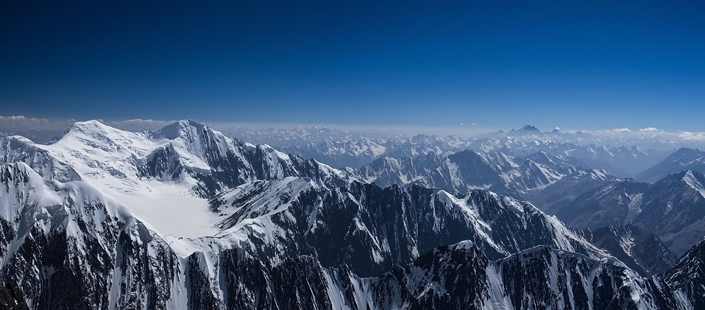 قلۀ نوشک اِشکاشم